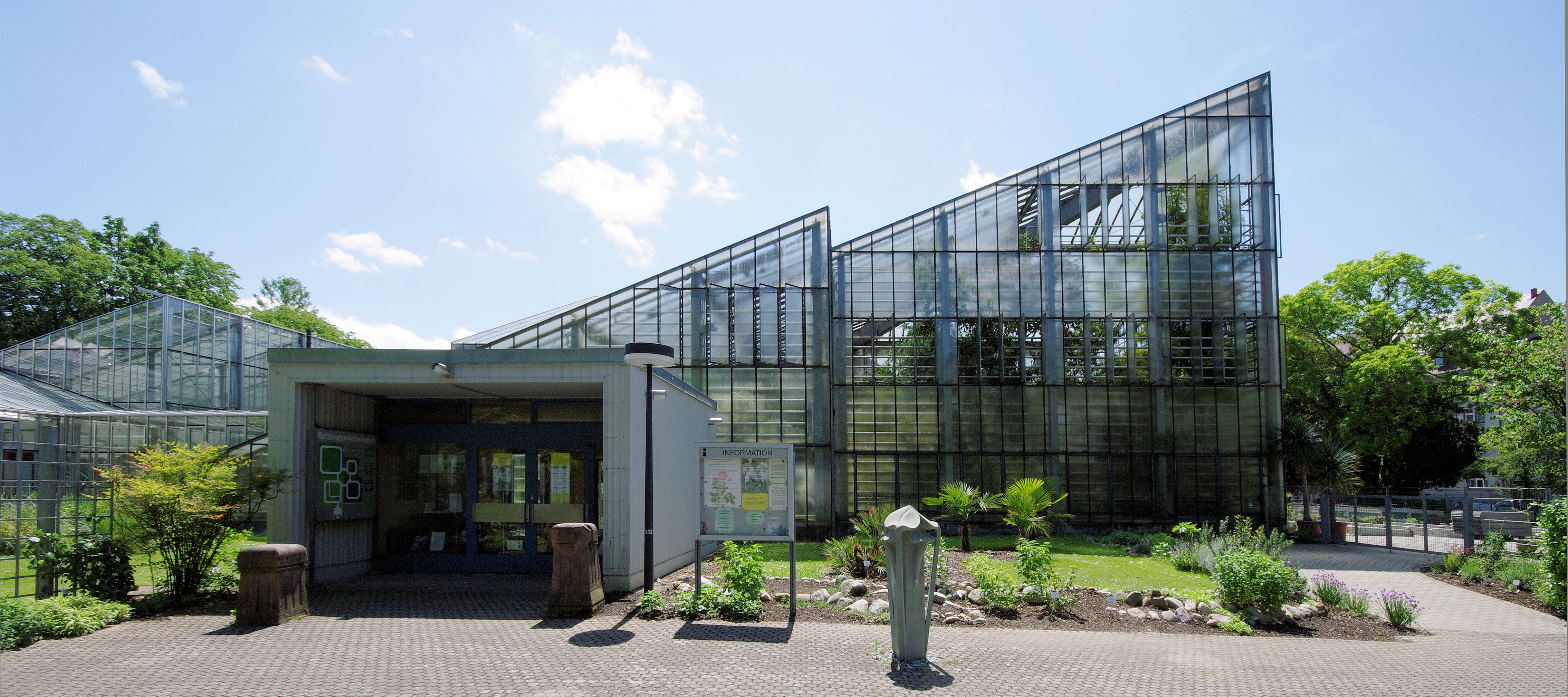 Der Zoologische Garten in Freiburg